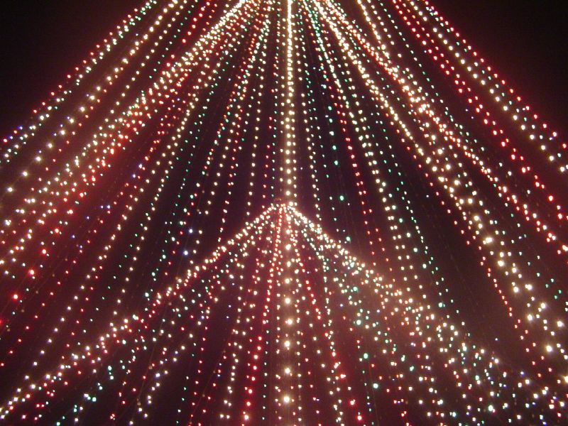 Árvore de Natal em Natal, Brasil.